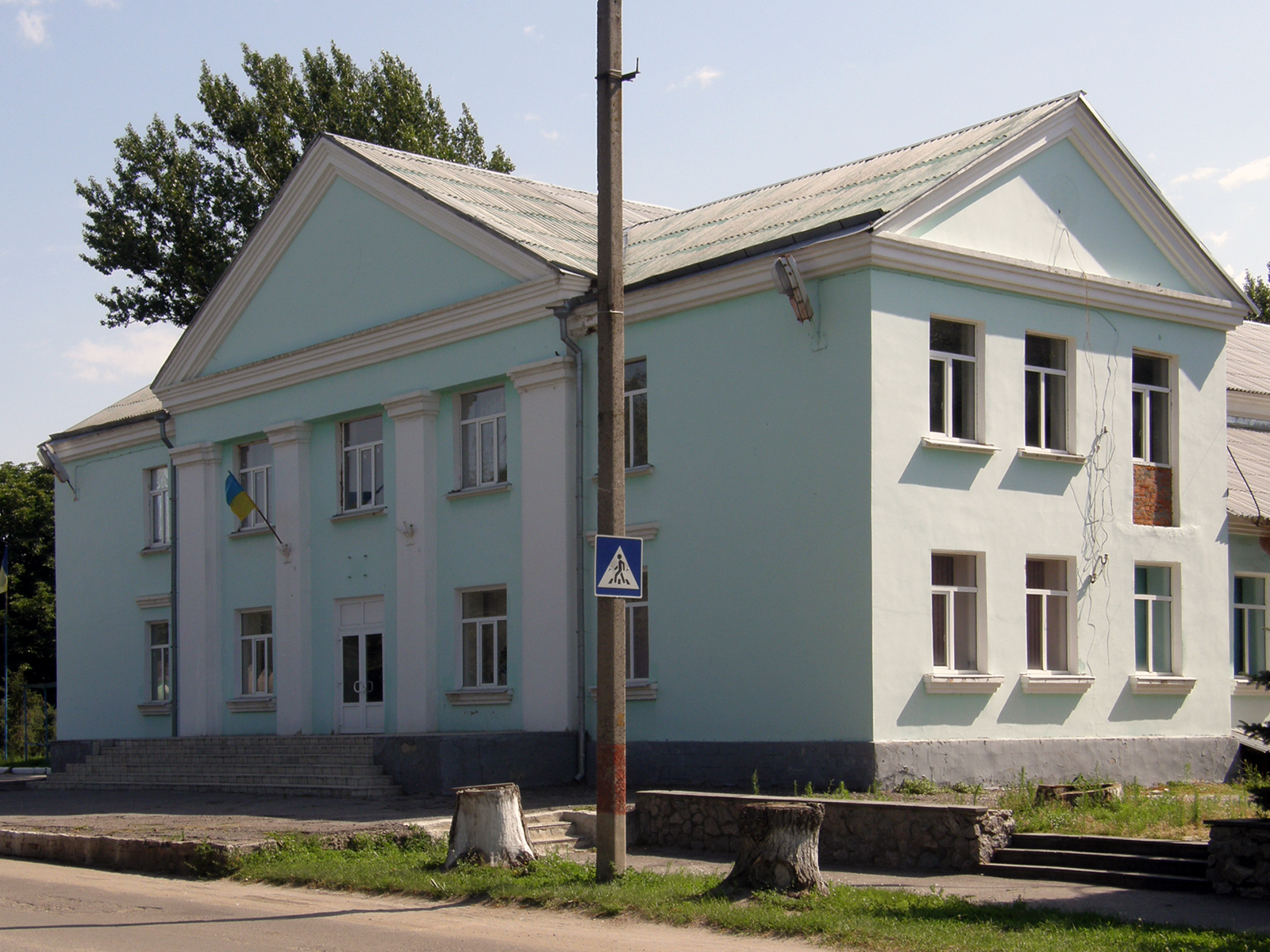 Дворец культуры Барвенковского района